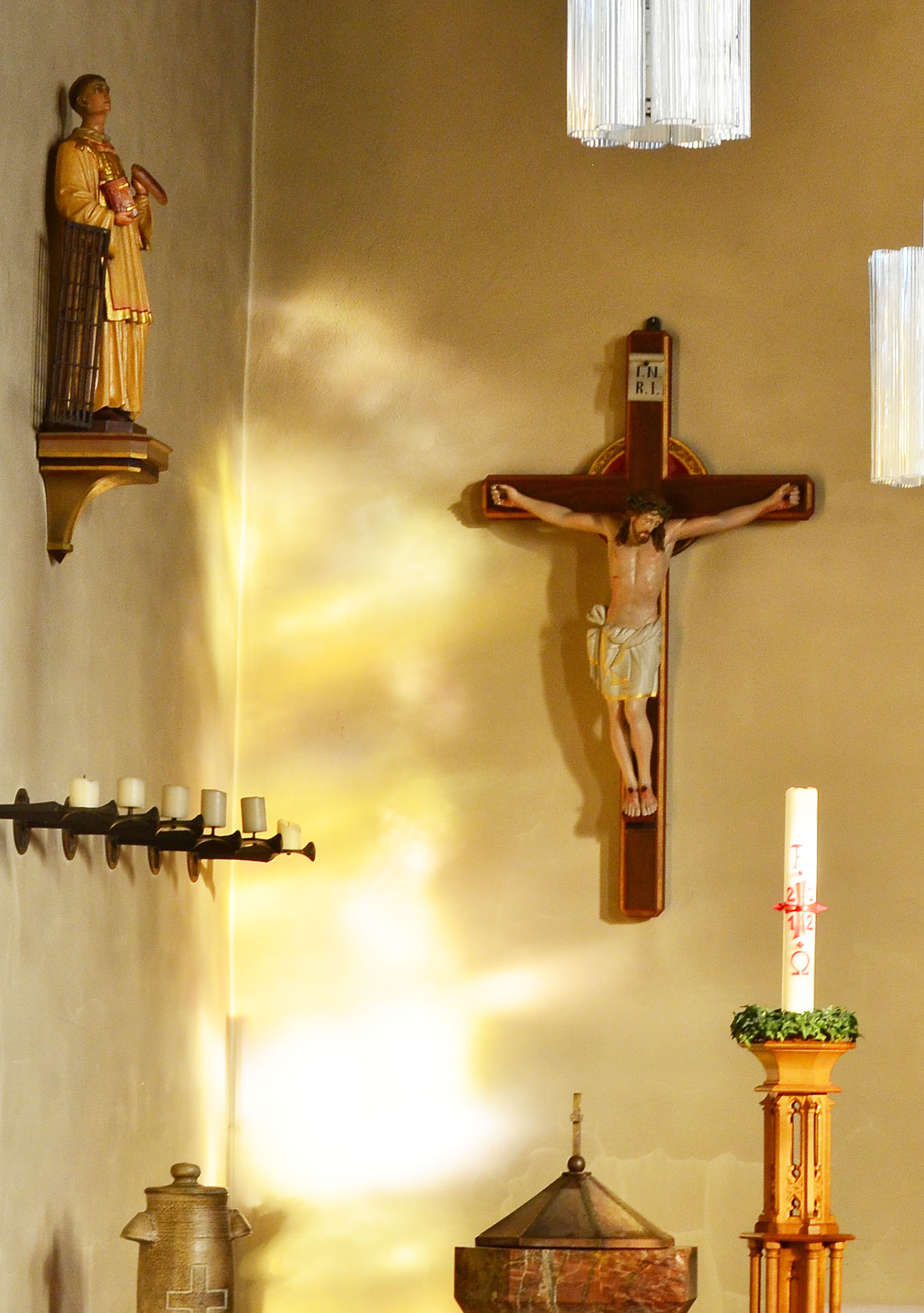 Brilon, Rösenbeck, St. Laurentius, Kreuz neben dem Chorraum